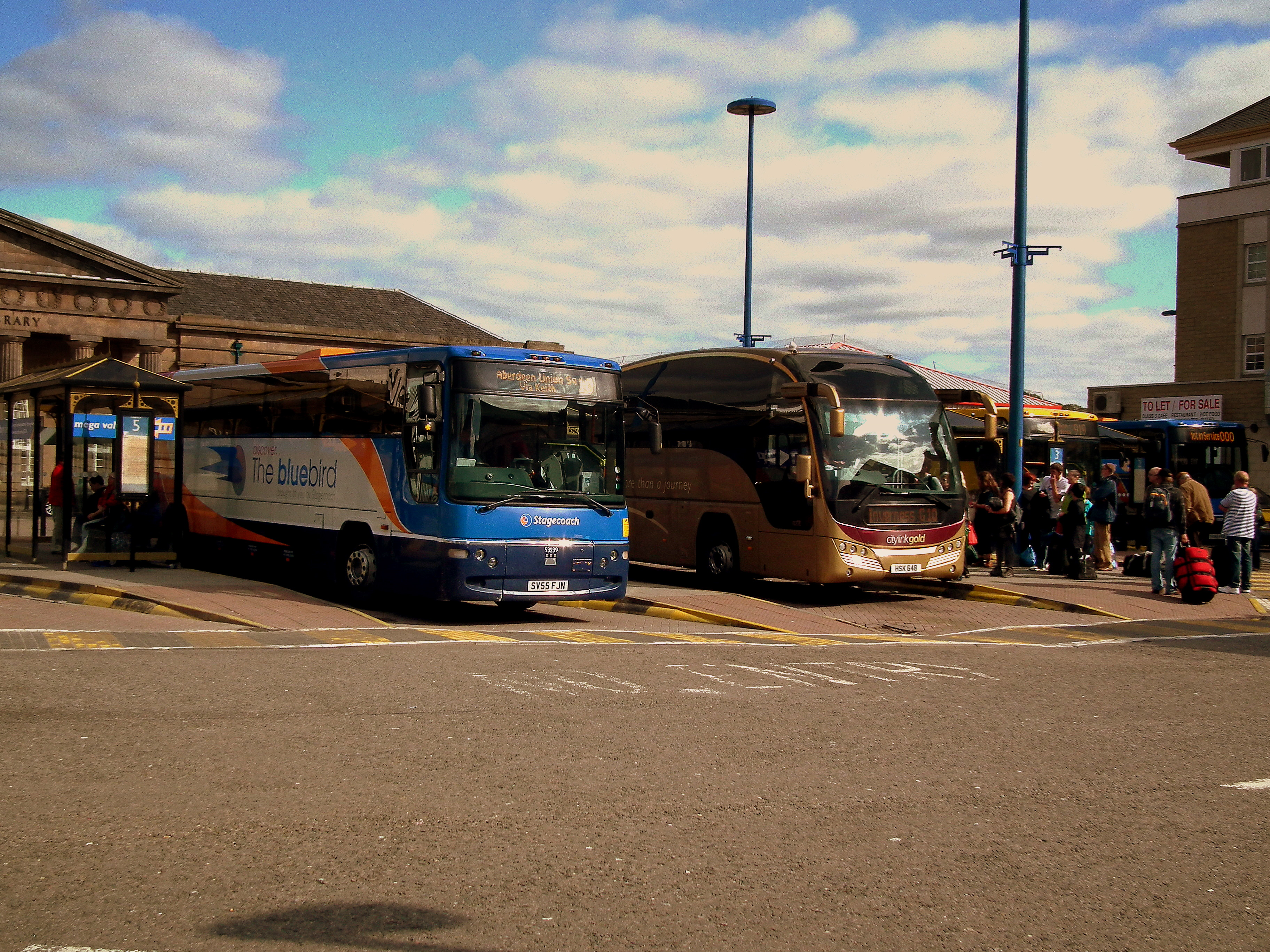 INVERNESS BUS STATION SEP 2011